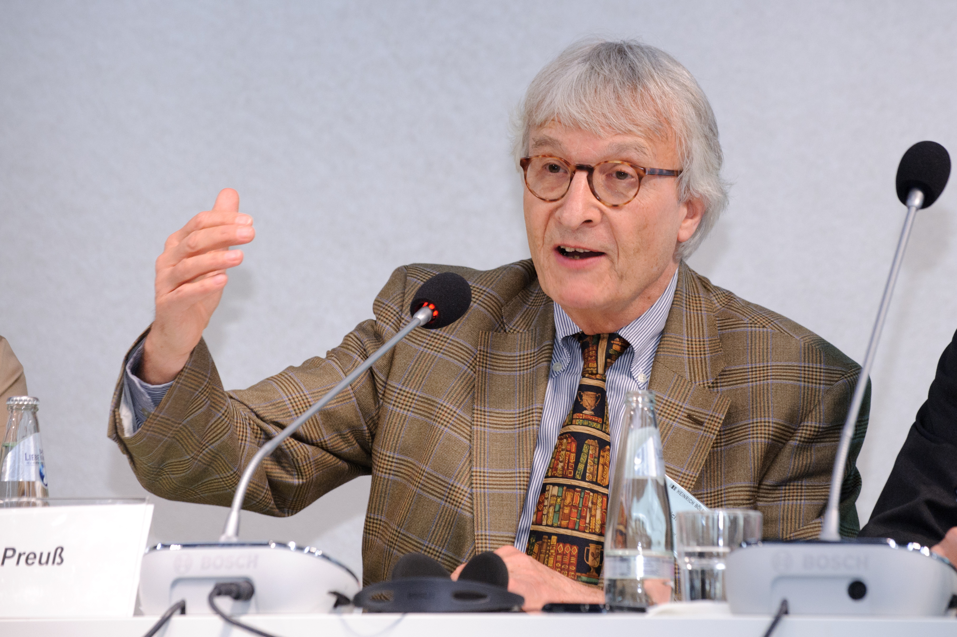 Konferenz: Solidarität und Stärke - Zur Zukunft der Europäischen Union, Prof. Ulrich K. Preuß (Emeritus, Professor für Recht und Politik, Berlin).